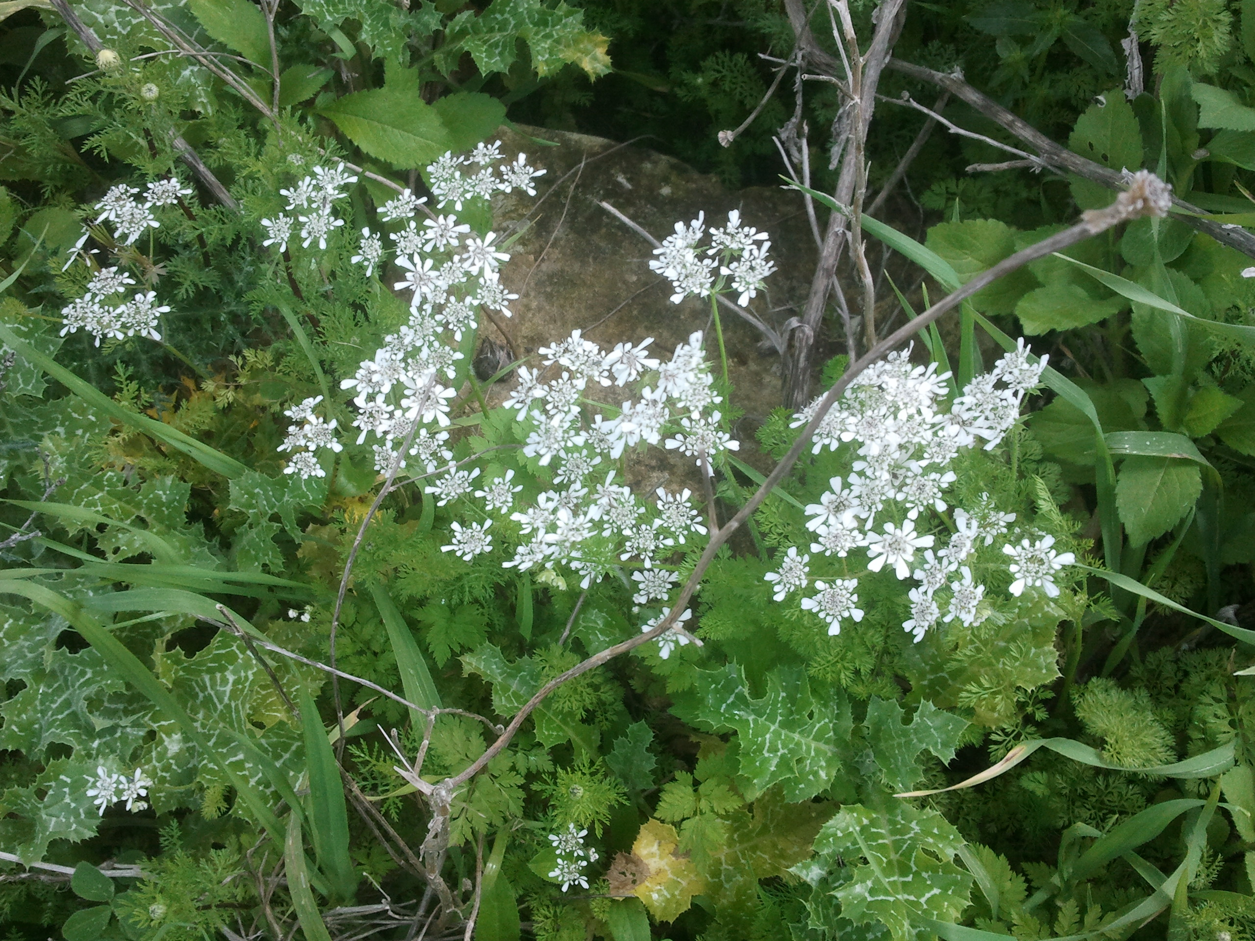 מסרק שולמית צמח חד שניתי ממשפחת הסוככניים, צולם בנחל תות ברמות מנשה